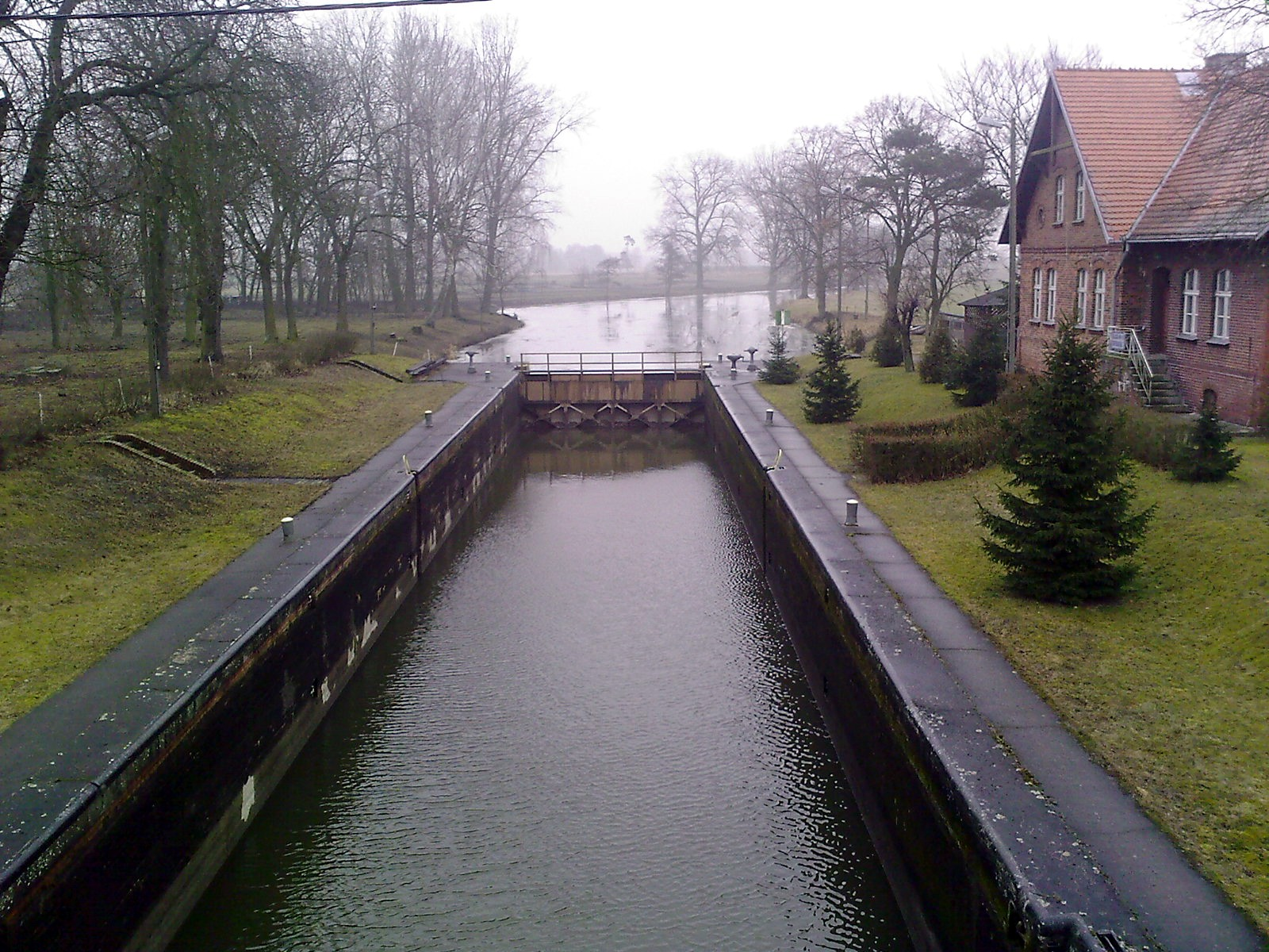 Gromadno (powiat nakielski, woj. kujawsko-pomorskie) - stopień piętrzący (śluza żeglugowa nr 10) na Noteci Leniwej.